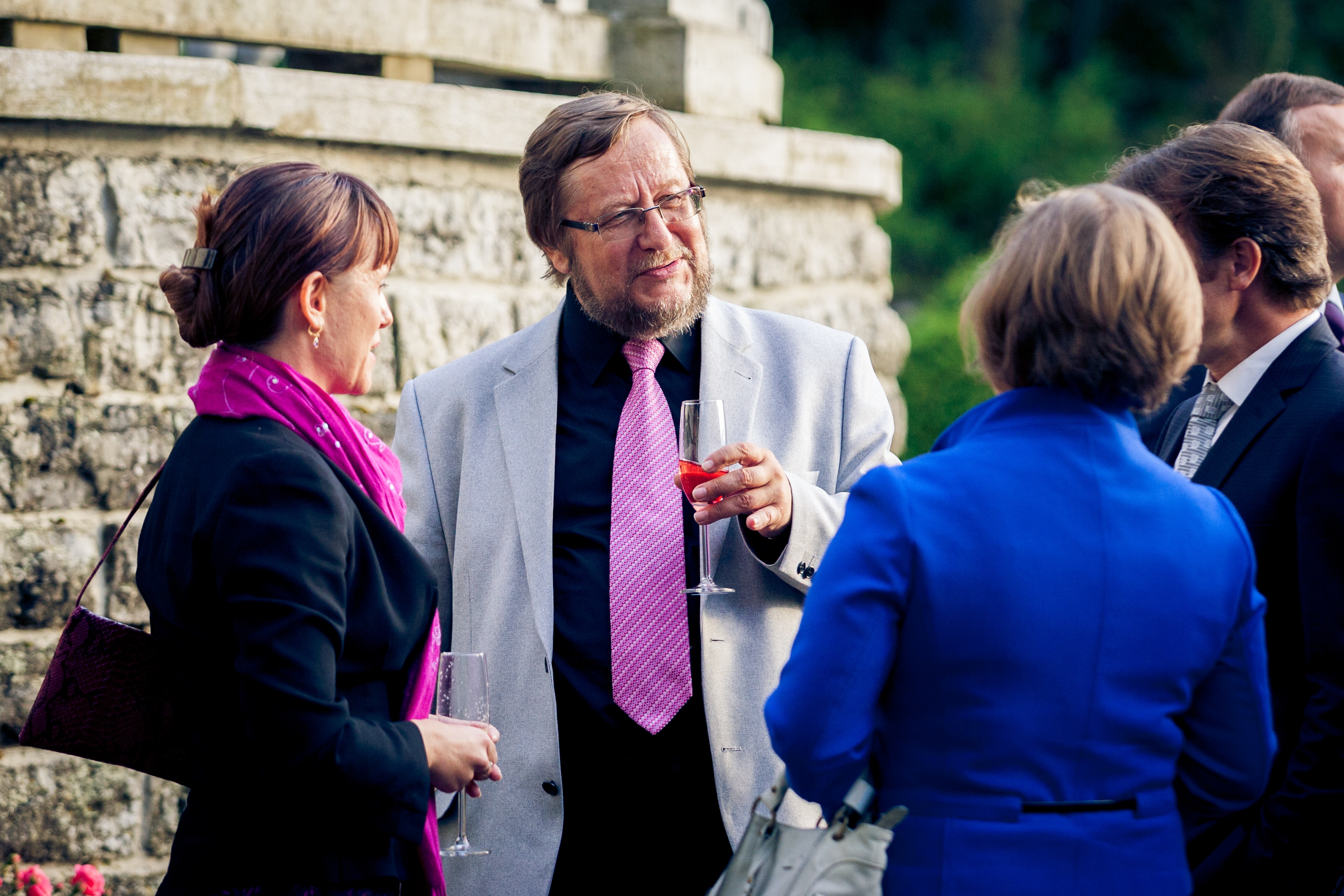 Harri Tiido (suursaadik Eesti alalises esinduses Euroopa Liidu juures).